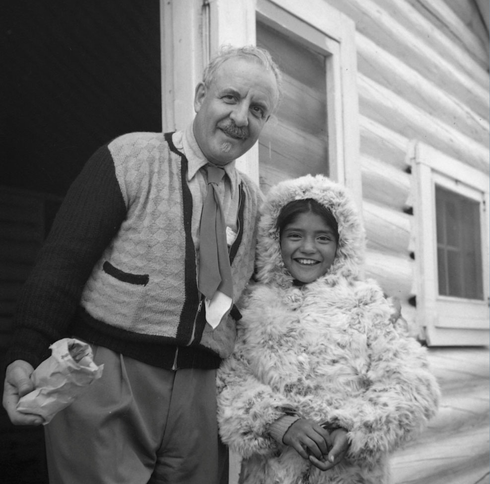 L'Honorable Camille-Eugène Pouliot, ministre de la Chasse et de la Pêche au Grand Lac Mistassini